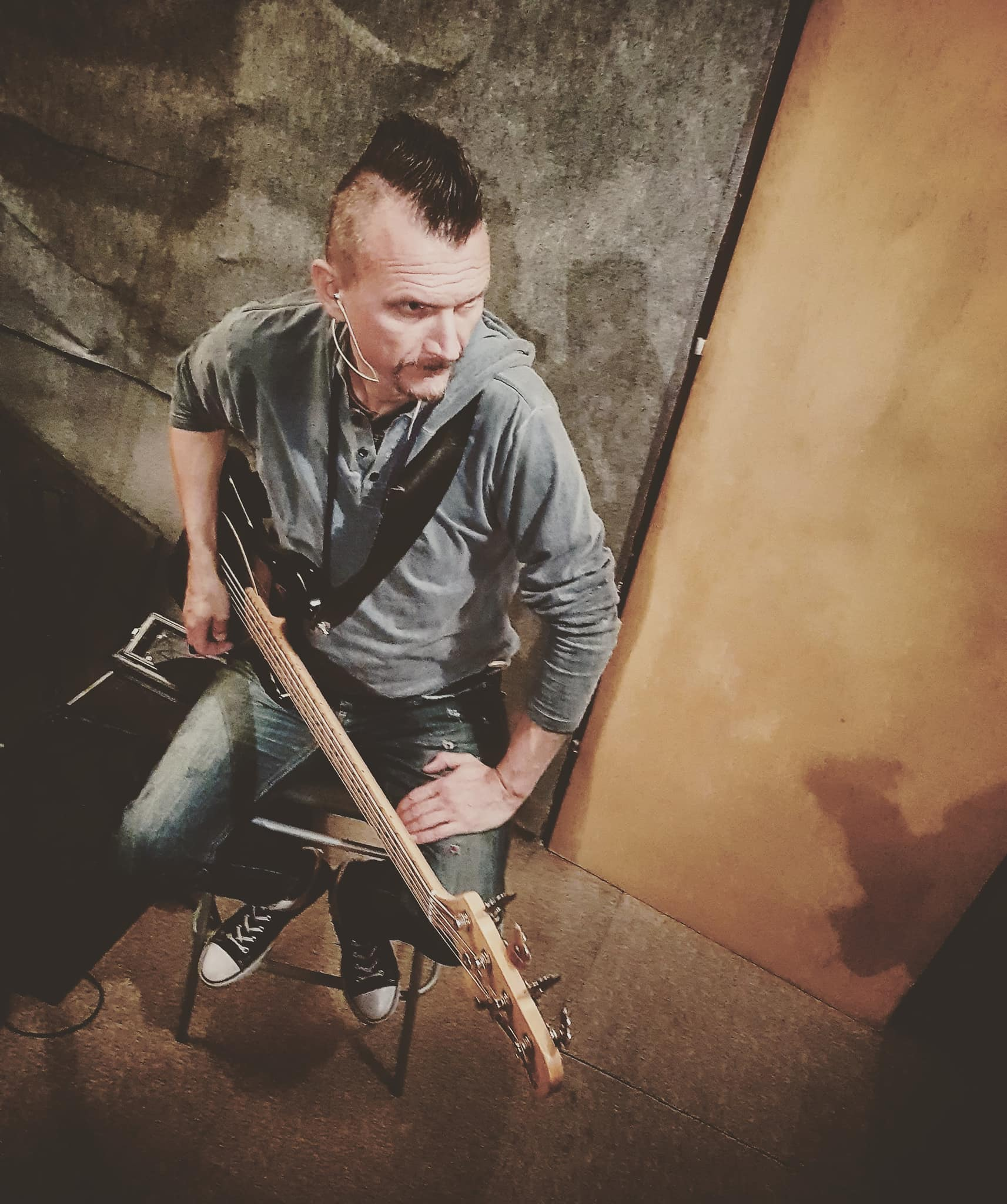 Andrzej "Pierwiastek" Potęga, polski gitarzysta basowy (m.in. Jary ODDZIAŁ ZAMKNIĘTY)